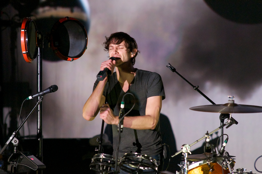 O cantor Gotye.